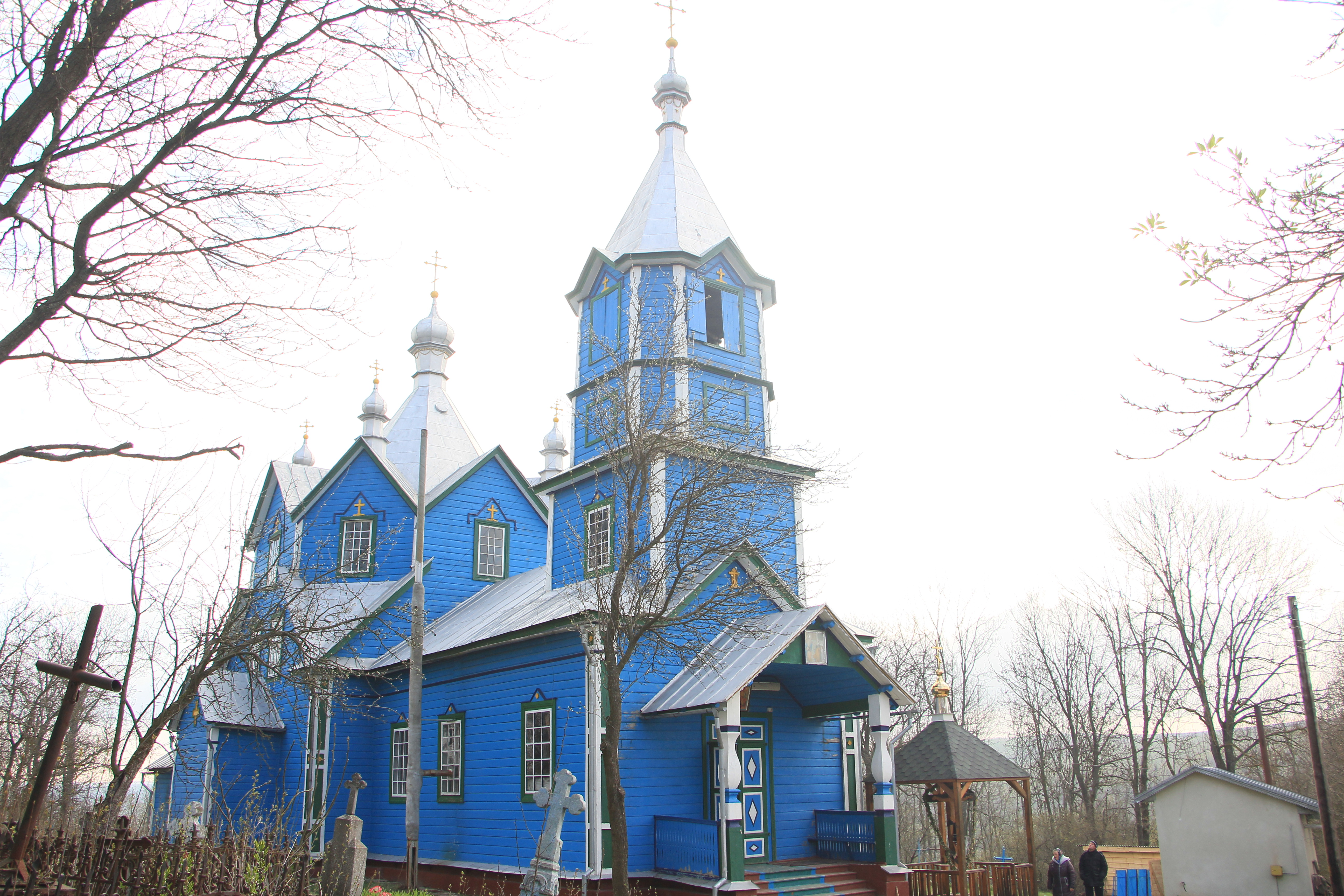 Дерев'яна церква в селі Старий Тараж Кременецького району Тернопільської області